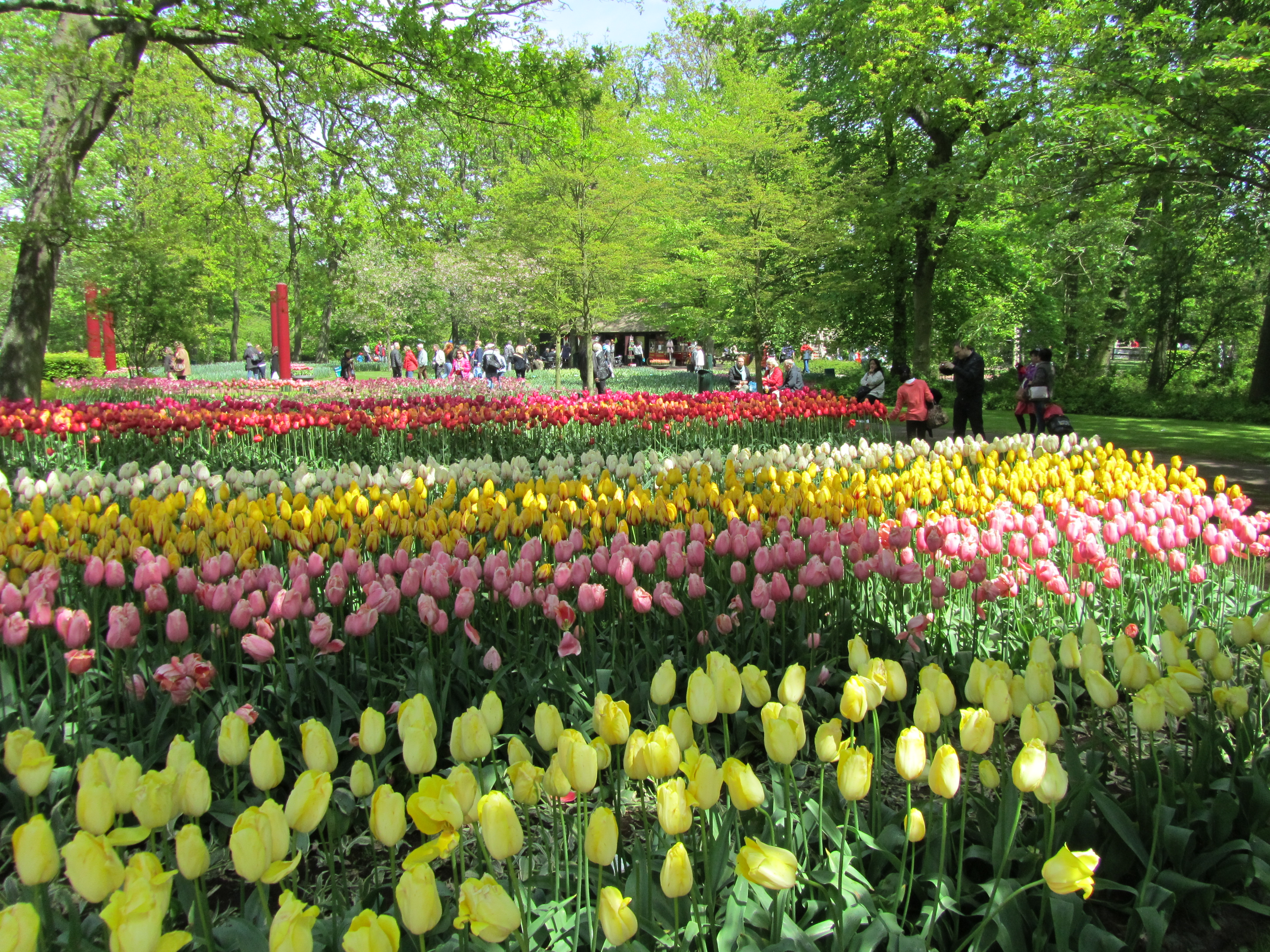 Keukenhof Garden